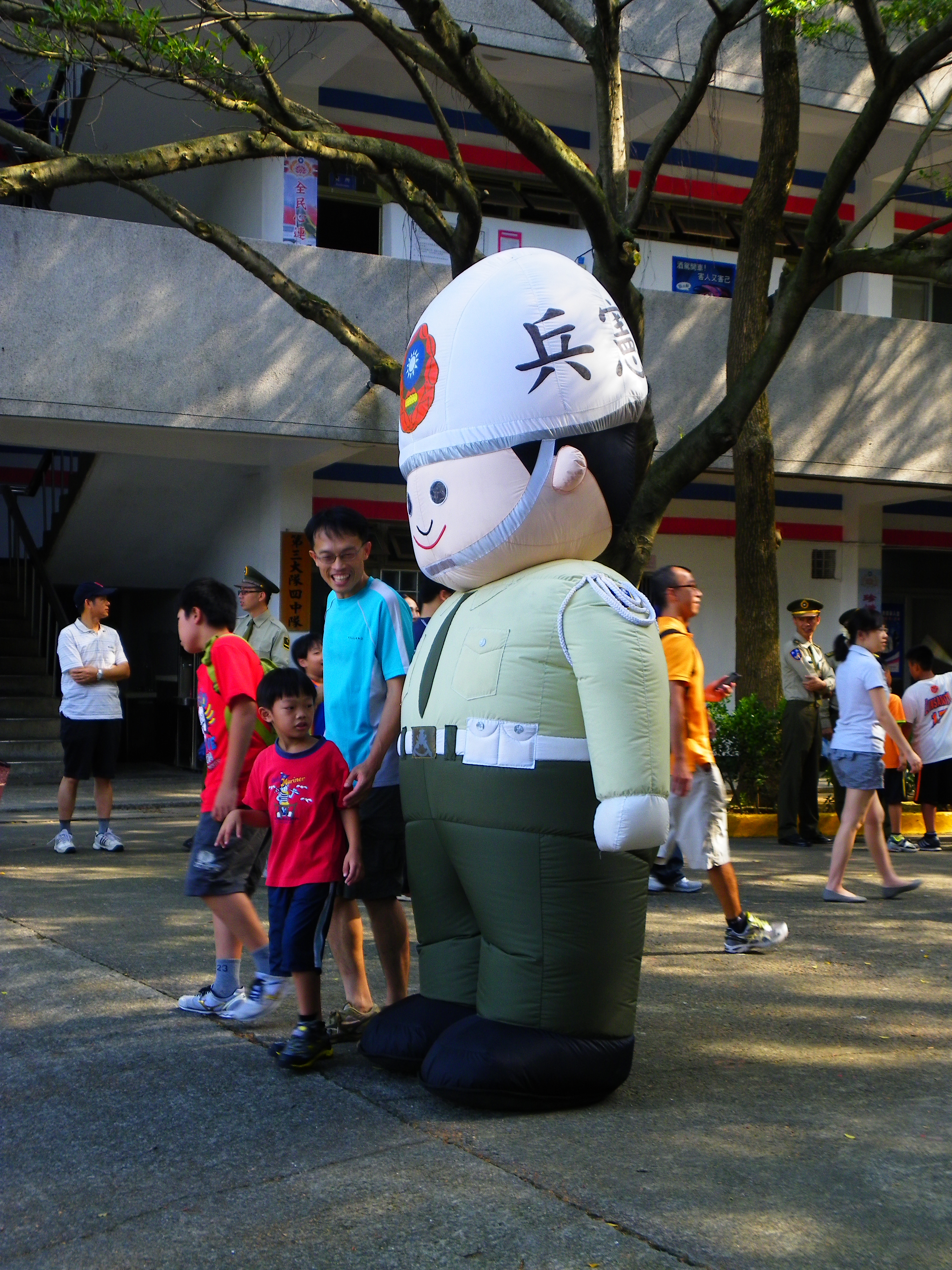 2012年憲兵學校林口營區開放活動，學生第三大隊第四中隊隊部前，民眾與憲兵吉祥物合照。